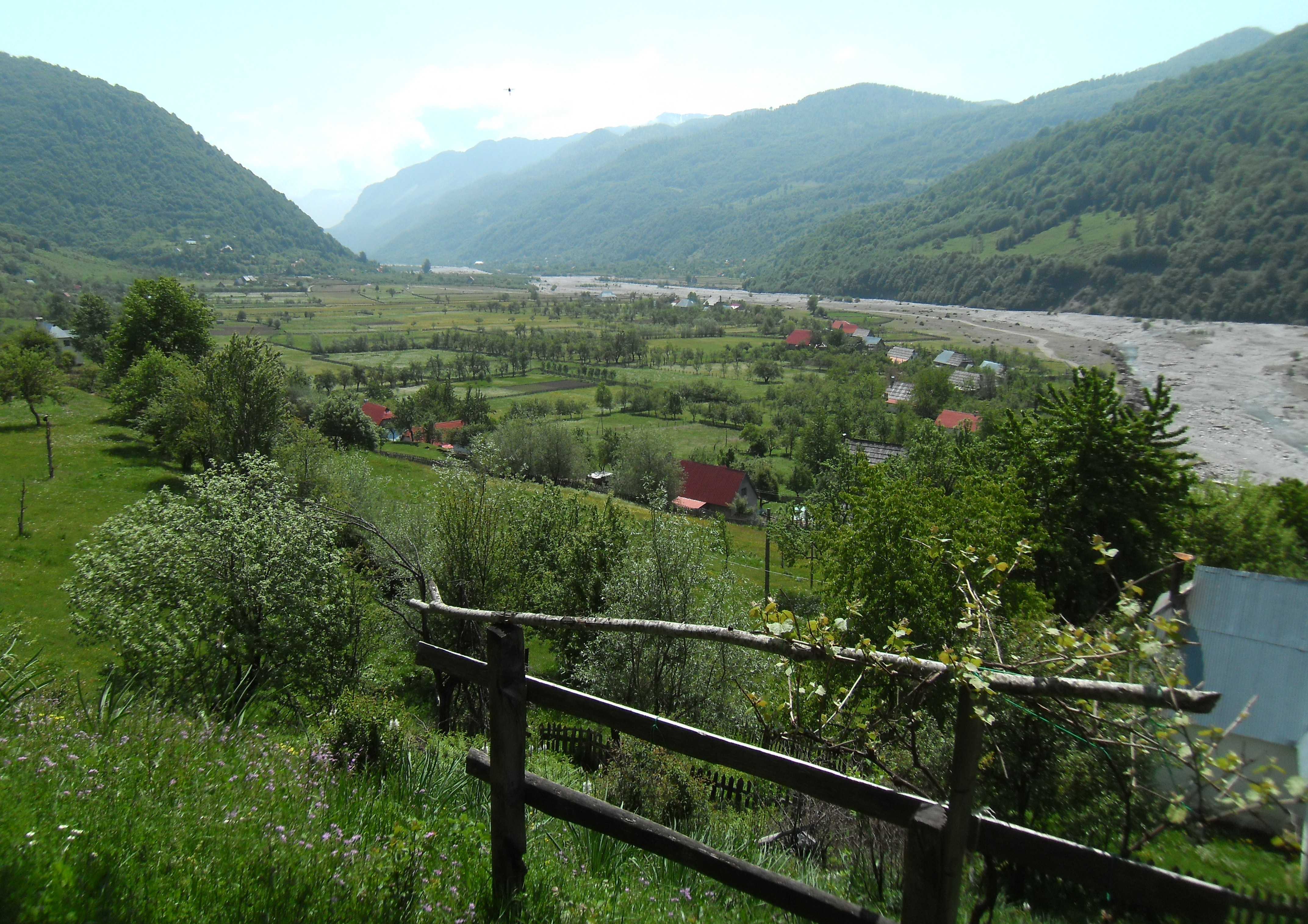 Blick über das Vermosh-Tal in Richtung Osten